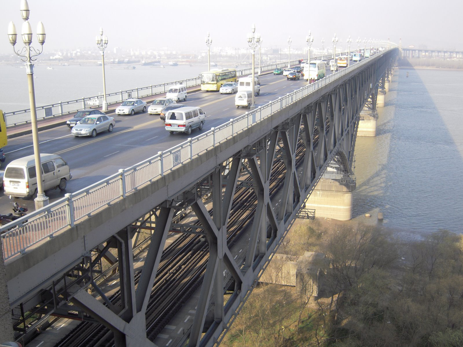 Nanjing Yangtze River Bridge